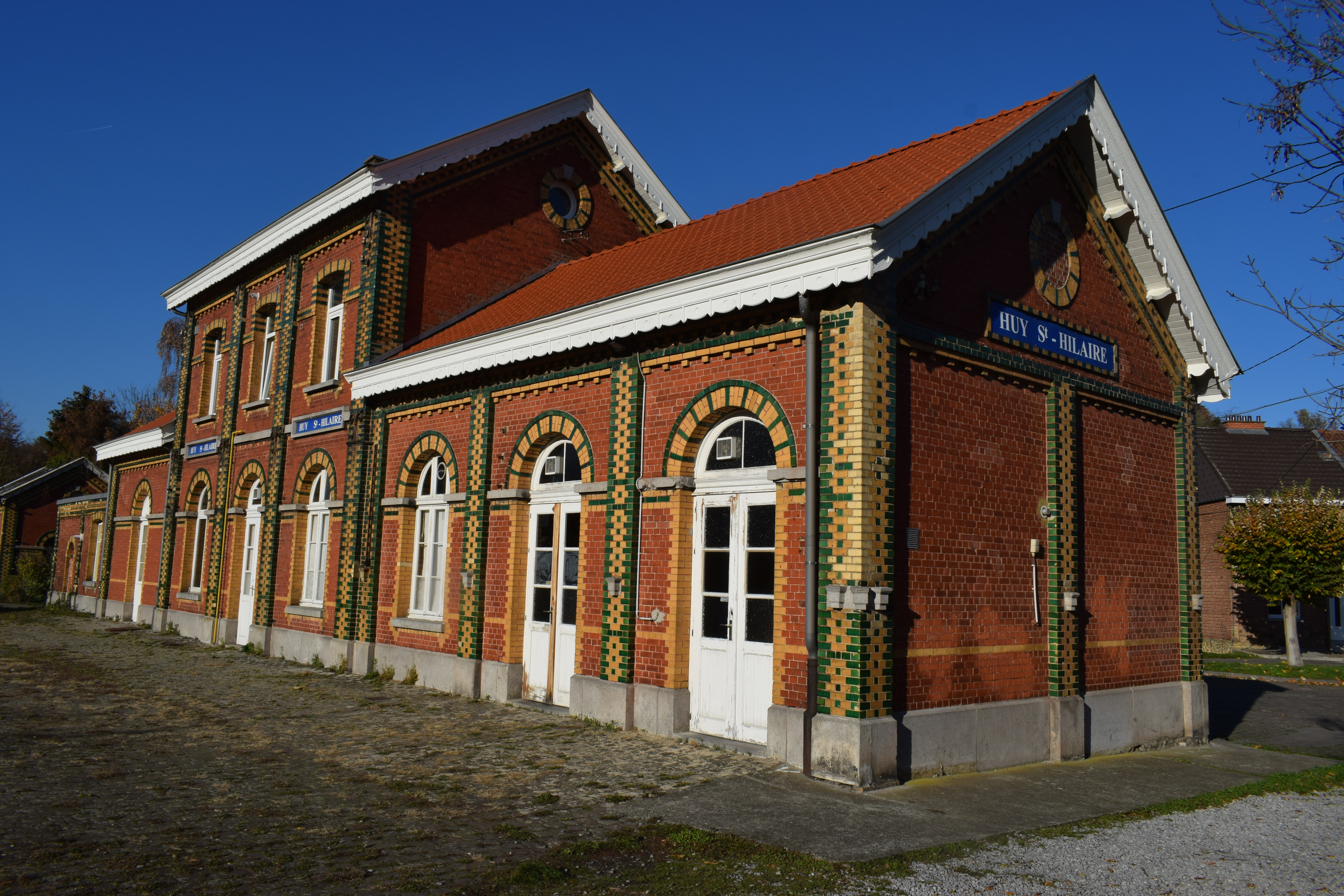 Vue de l'ancienne gare de Huy Saint-Hilaire, sur la rive gauche de la Meuse à Huy (Belgique).